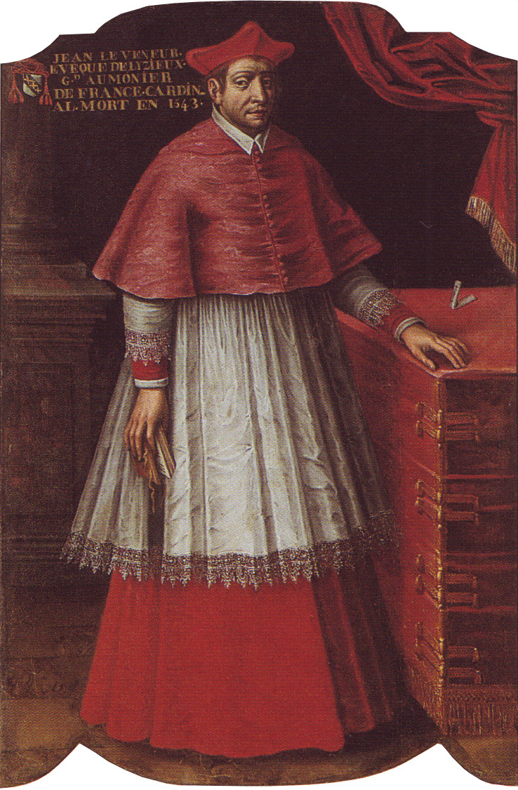 Posthumes Porträt des Kardinals Jean Le Veneur (1473-1543)